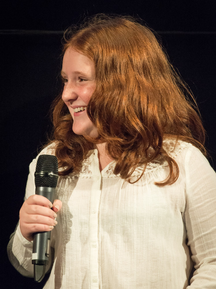 Rebecka Josephson under presentationen av den Svenska filmhösten i Filmhuset i Stockholm den 17 augusti 2015.